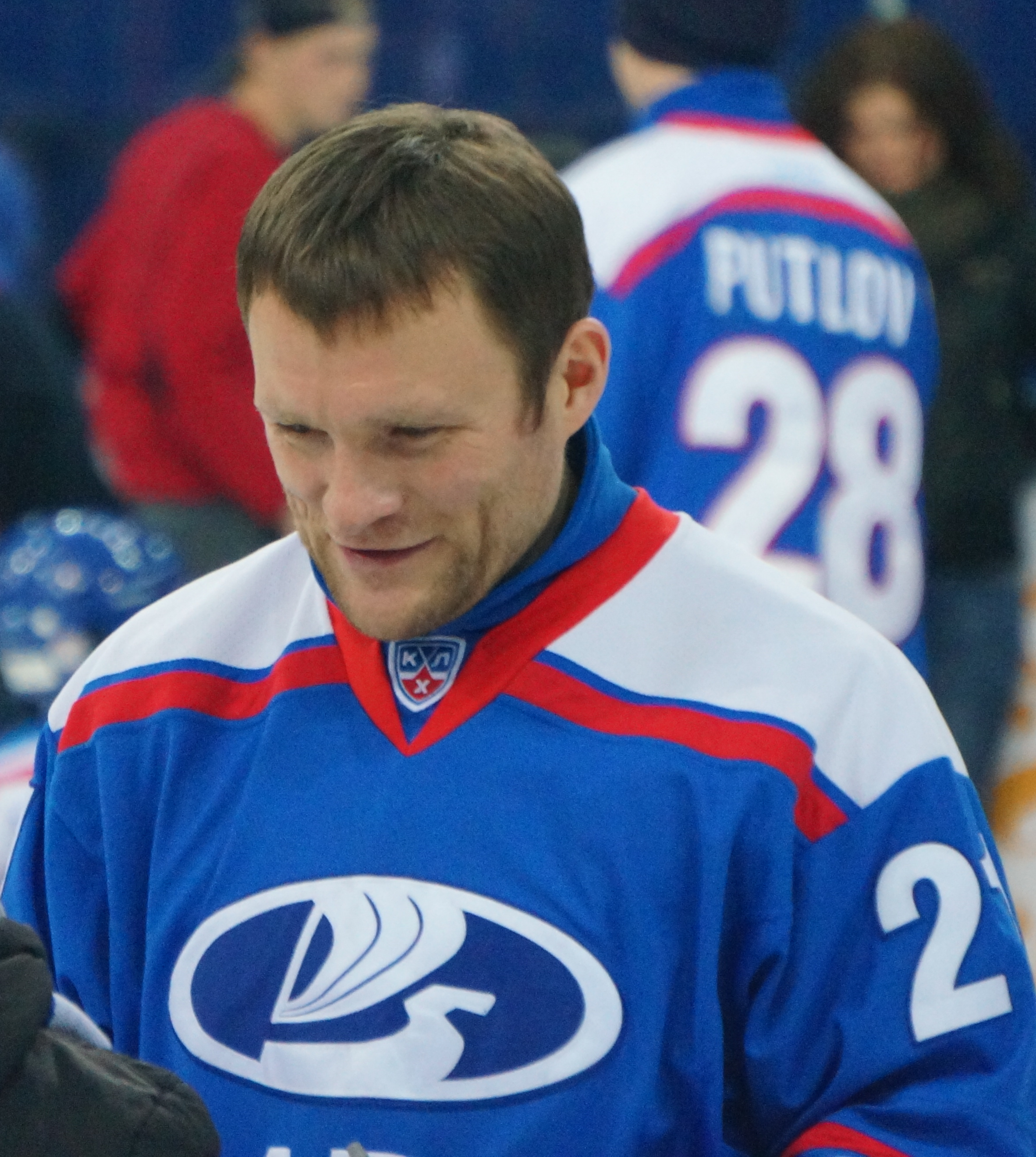 Нападающий ХК "Лада" Игорь Магогин в ходе совместного с болельщиками клуба катания